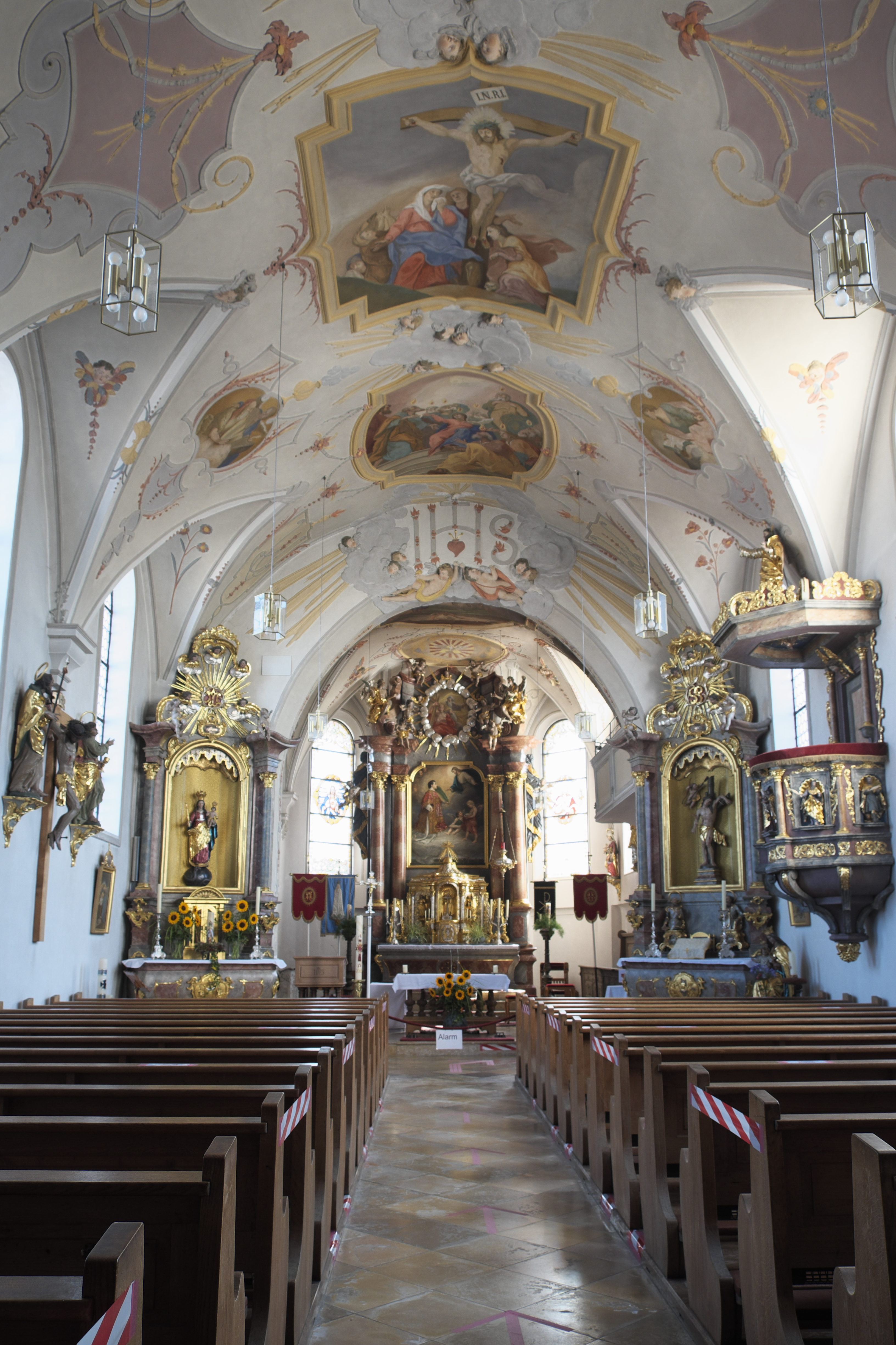 Katholische Pfarrkirche St. Stephan in Kissing im scchwäbischen Landkreis Aichach-Friedberg (Bayern/Deutschland), Innenraum, Stuckdekor um 1725